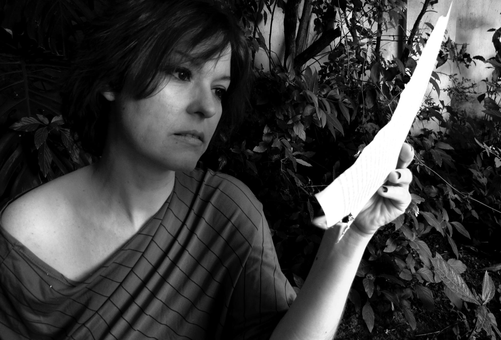 Fernanda García Lao